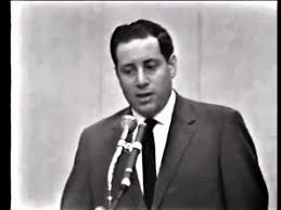 מרכי אנסבכר בזמן עדותו במשפט אייכמן